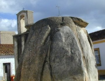 Anta de Pavia